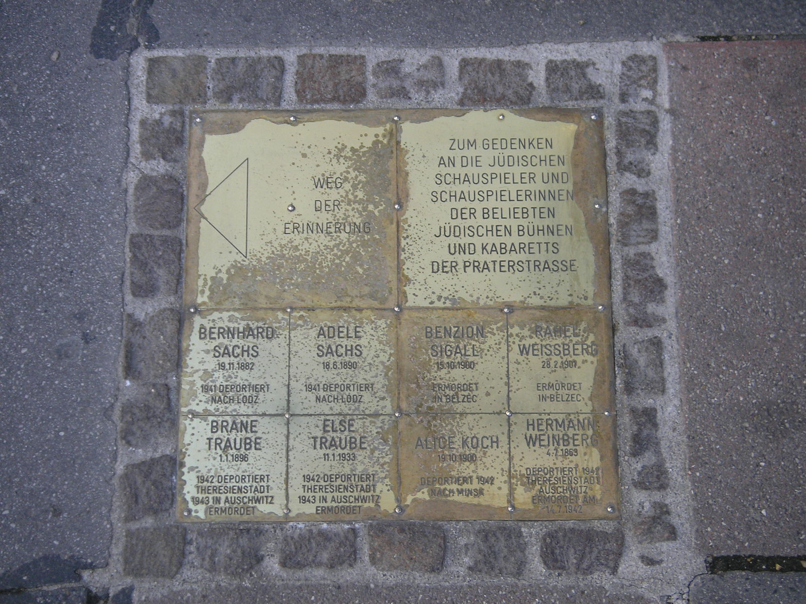 One of the bronze plaques remembering Austrian Jewish Holocaust victims, in the II. district Leopoldstadt, Praterstraße 36.Information: Wien Geschichte Wiki: Stein der Erinnerung - Jüdische Schauspieler und Bühnen der Praterstraße.The actors and actresses: Bernhard Sachs, Adele Sachs, Benzion Sigall, Rahel Weissberg, Brane Traube, Else Traube, Alice Koch and Hermann Weinberg.